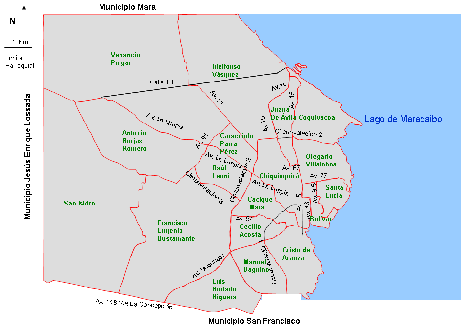 Mapa del Municipio Maracaibo y sus parroquias. Estado Zulia. Venezuela